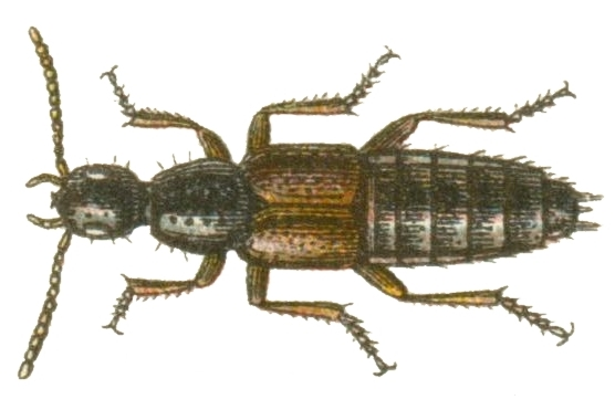 Fauna Germanica. Die Käfer des Deutschen Reiches. I. & II. Band. Farbendrucktafeln von Dr. K.G. Lutz. K.G. Lutz' Verlag, Stuttgart 1908 Philonthus varians